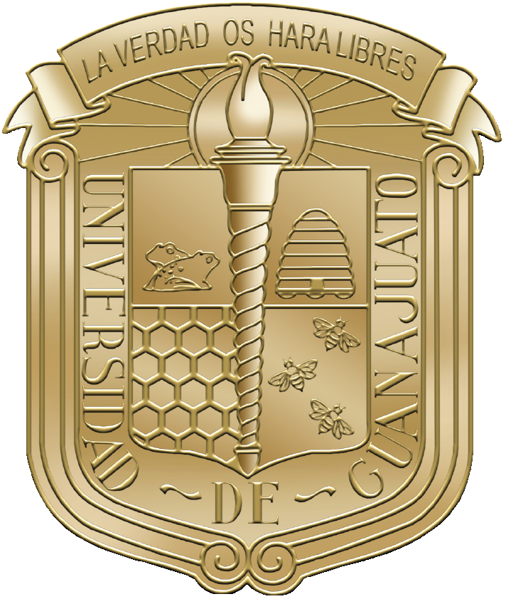 Escudo de la Universidad de Guanajuato